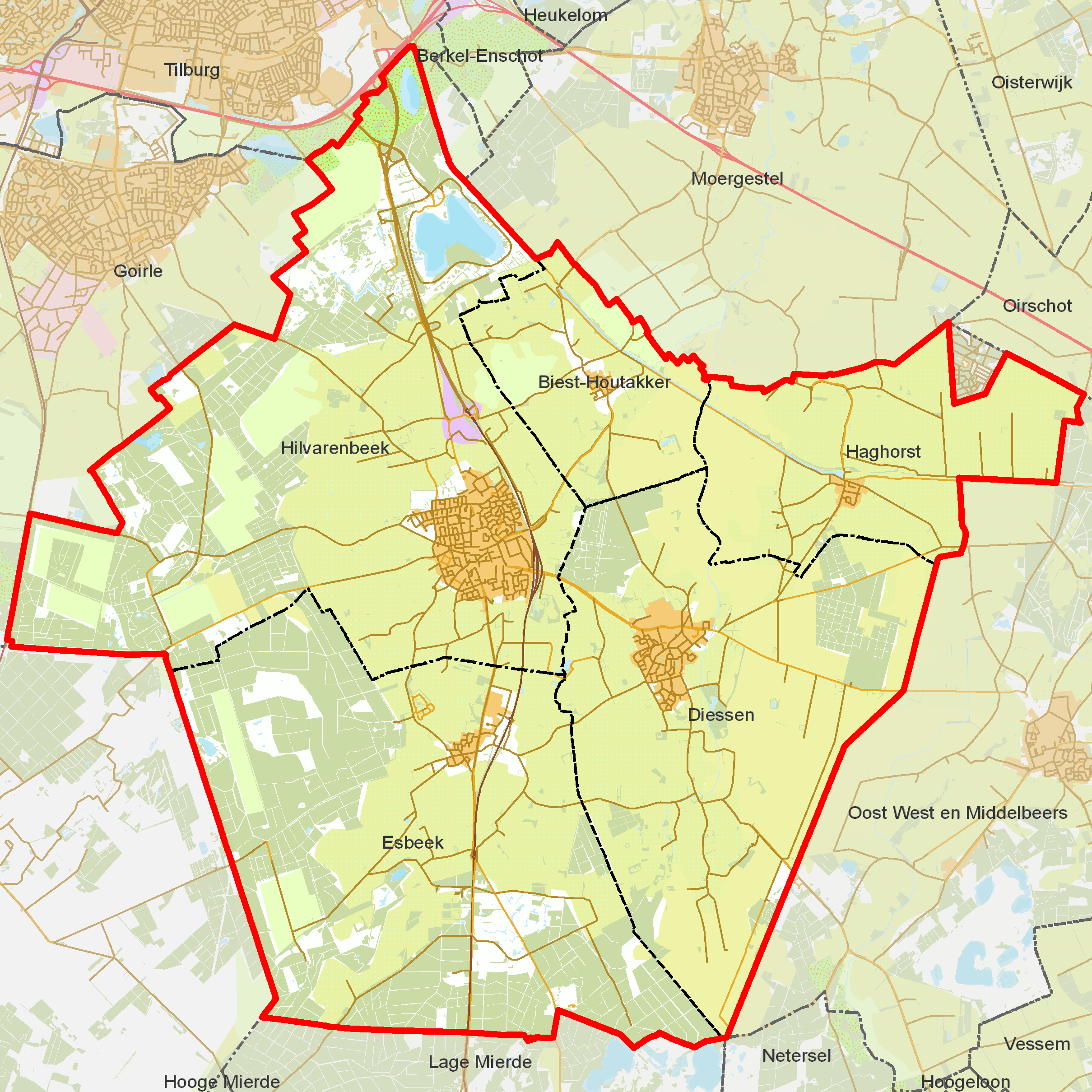 BAG woonplaatsen - Gemeente Hilvarenbeek.png